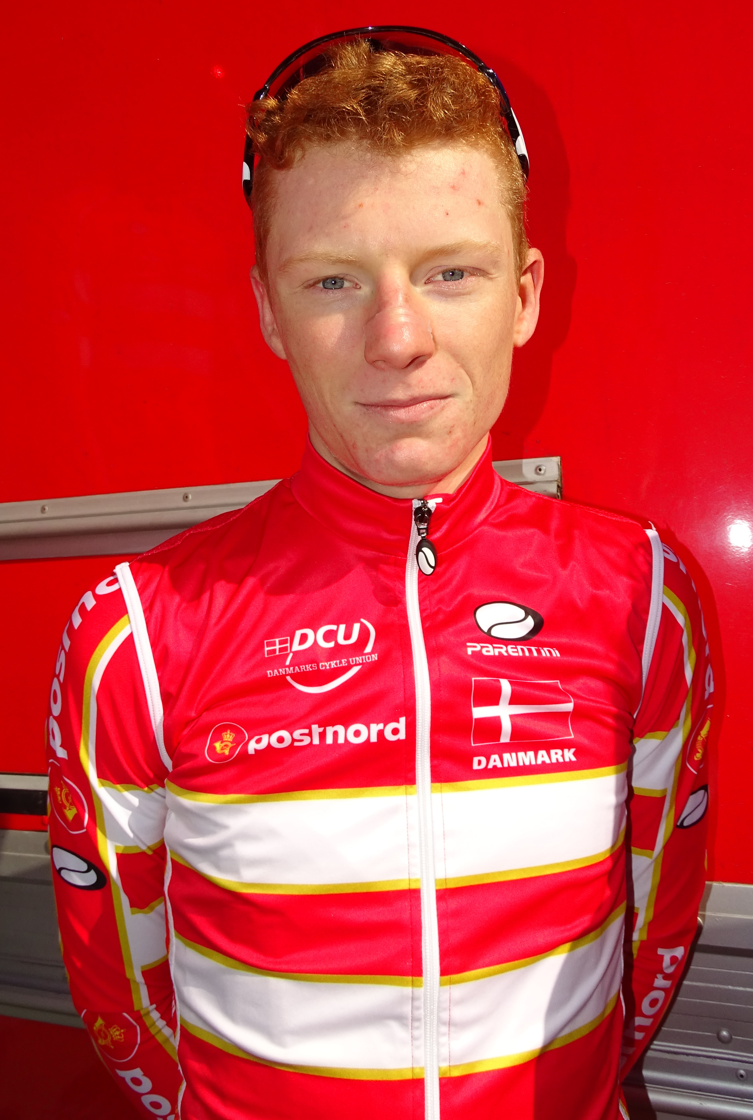 Reportage réalisé le dimanche 10 avril à l'occasion du départ du Paris-Roubaix juniors 2016 à Saint-Amand-les-Eaux, France.